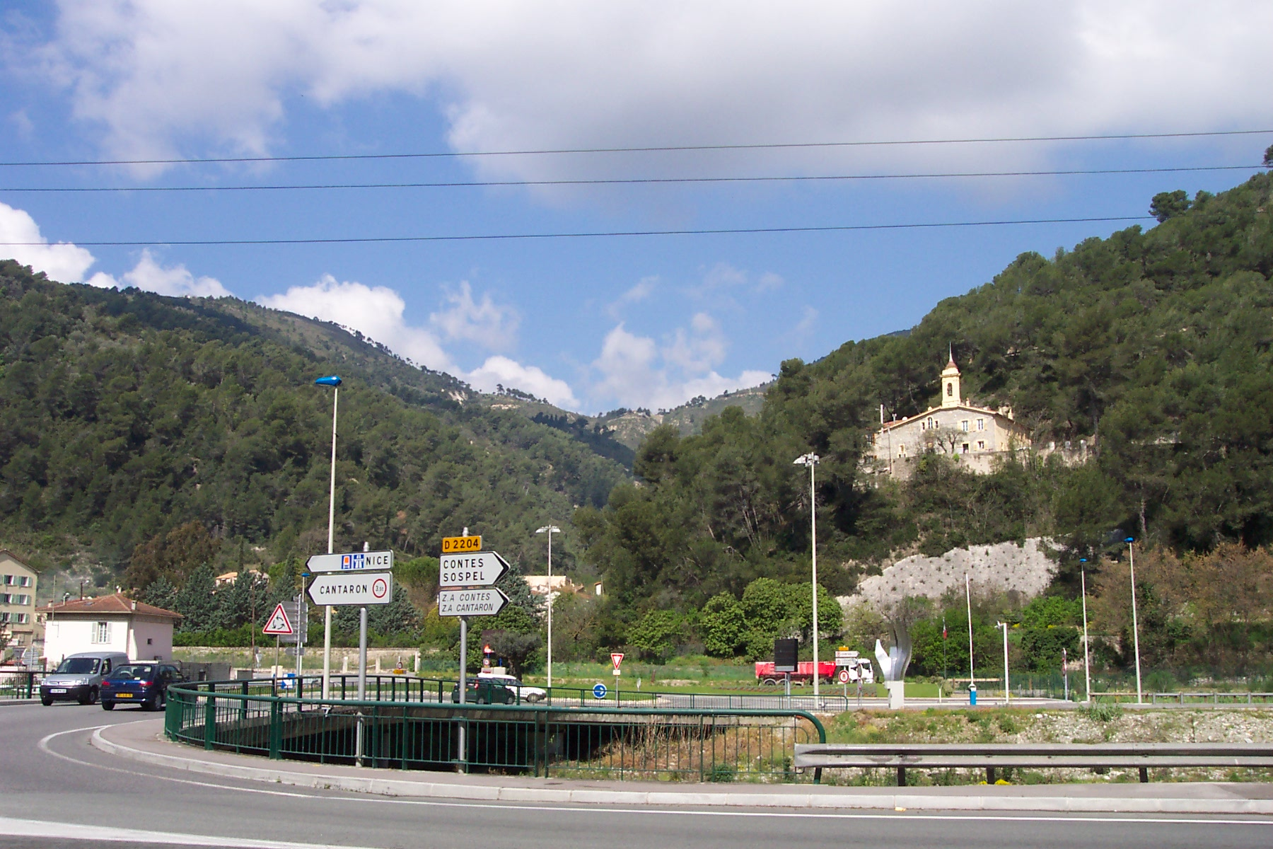 L'église et le cimetière à droite, le village est sur la gauche